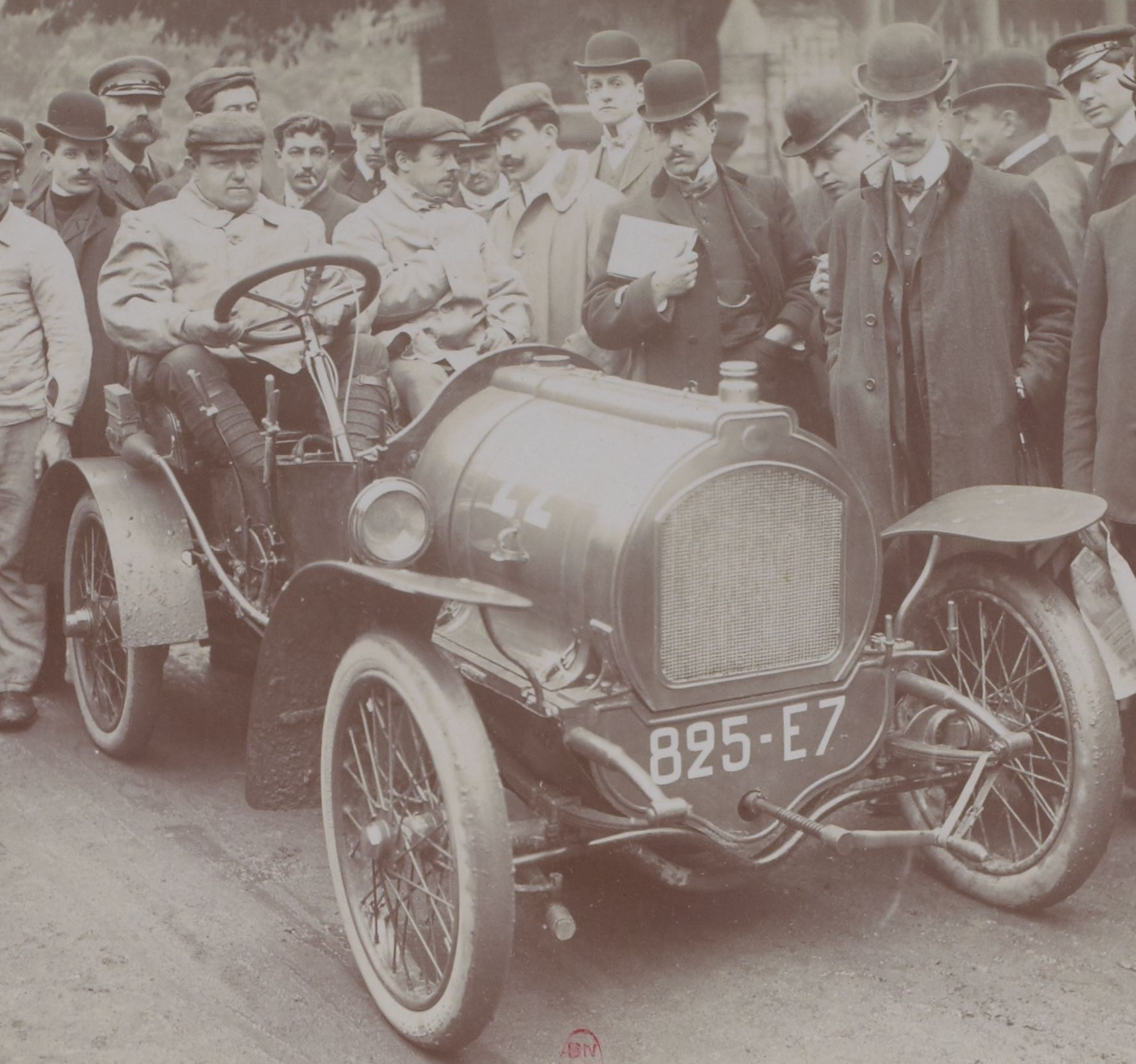 [Collection Jules Beau. Photographie sportive] : T. 32. AnnÃ©e 1906 / Jules Beau : F. 4. [Tour de France, organisÃ© par l' Autocycle Club de France et Les Sports, Porte Maillot, 22 mai 1906]